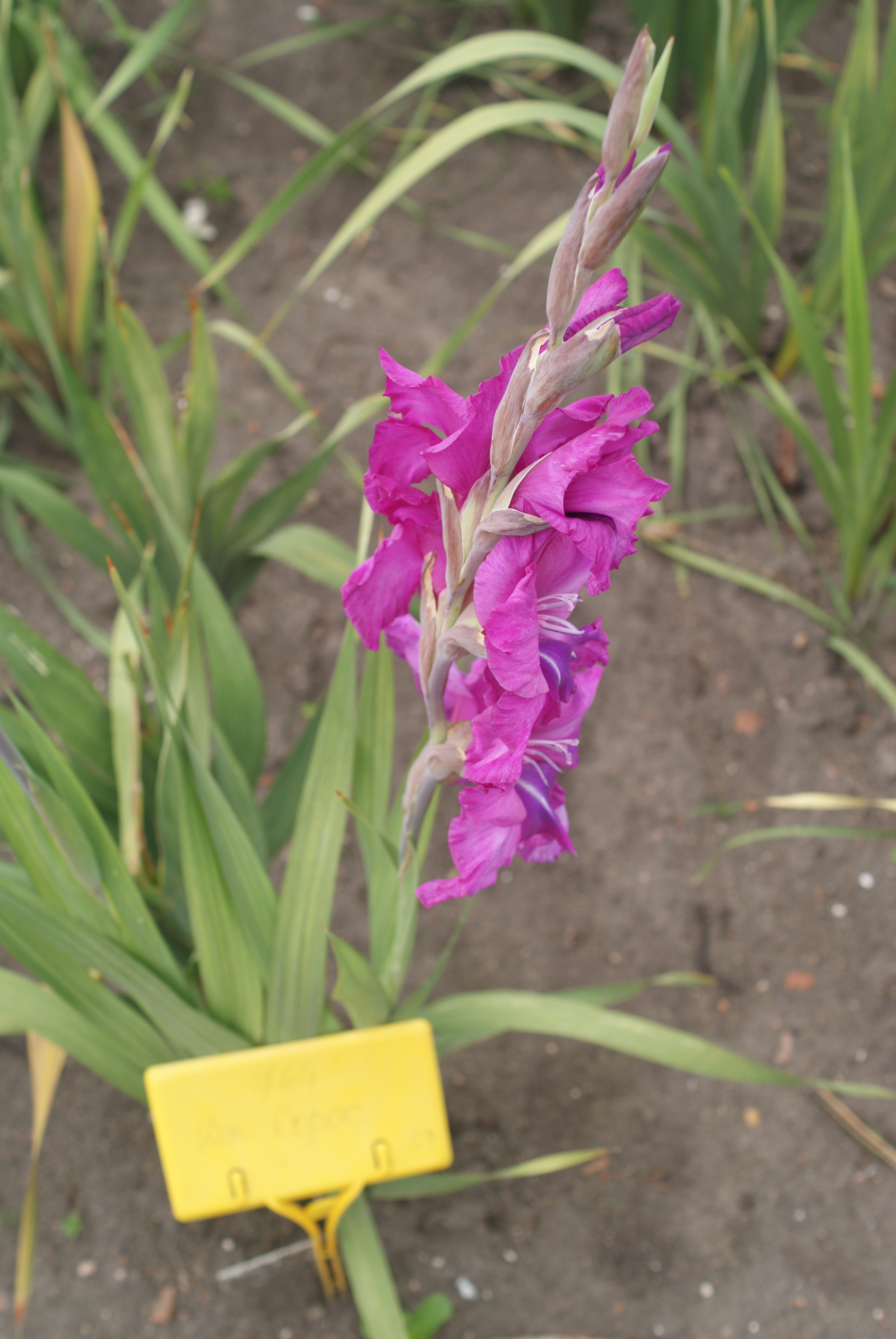 Gladiolus 'George Soros'